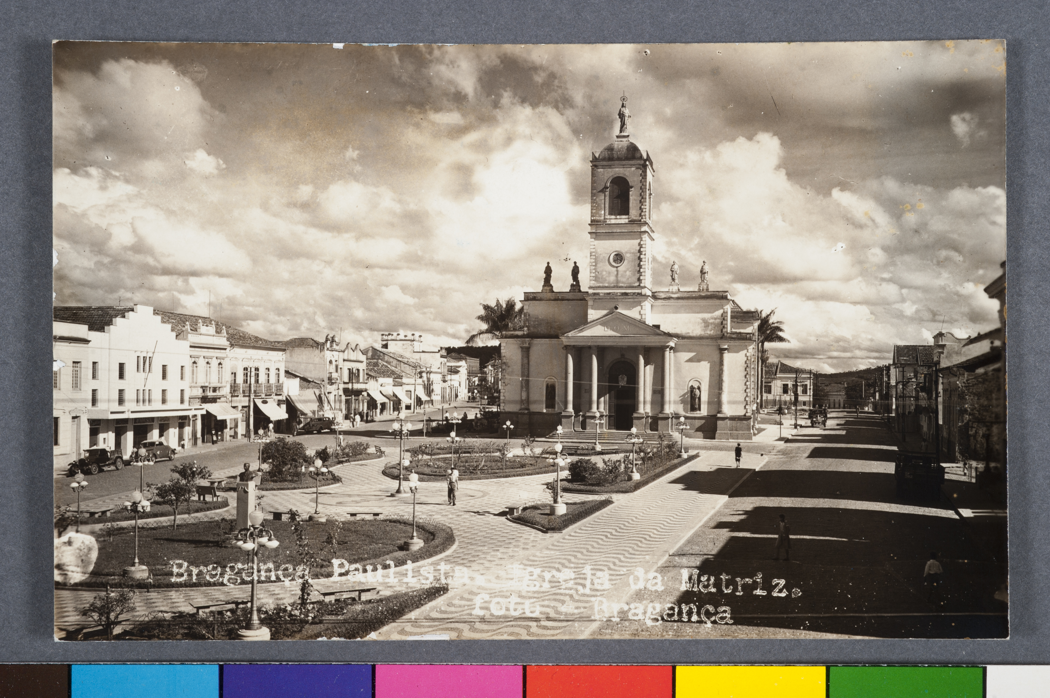 Obra que integra o acervo do Museu Paulista da USP. Coleção João Baptista de Campos Aguirra. Ref. Agente: Foto Bragança